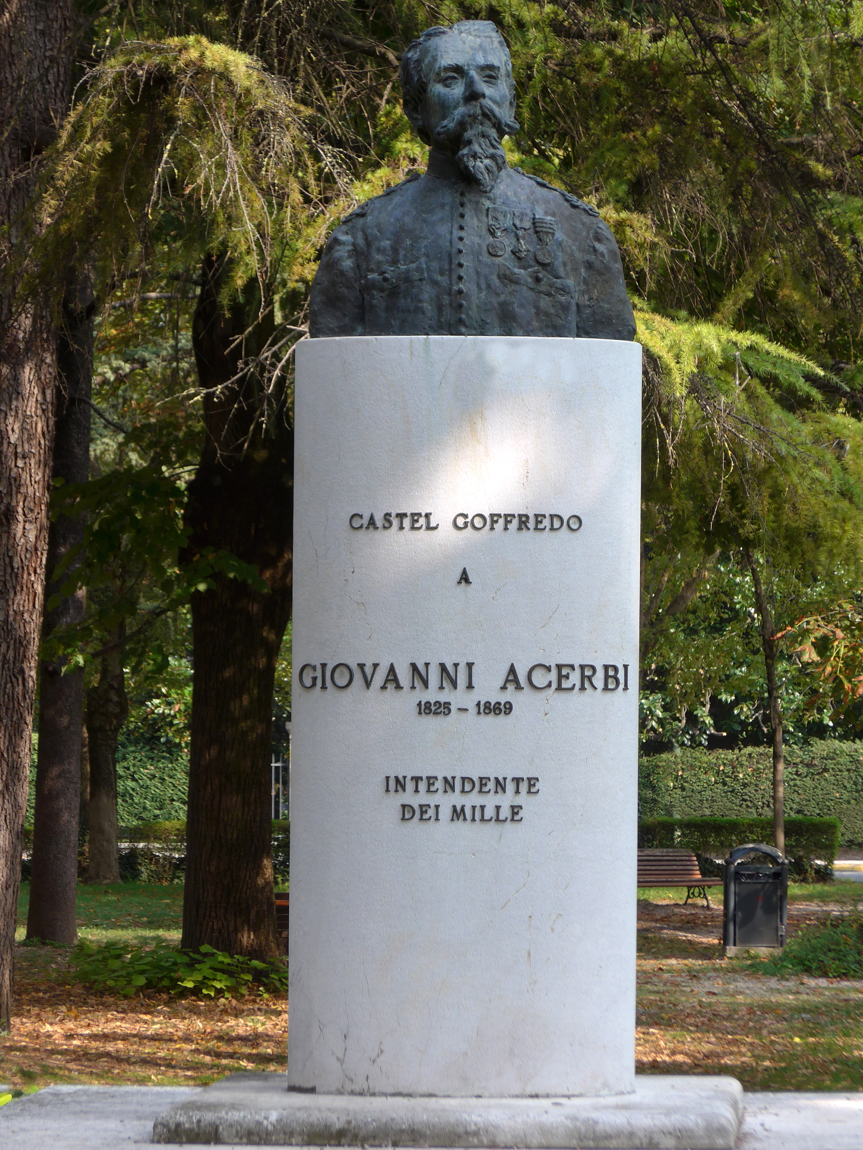 monumento a Giovanni Acerbi This is a photo of a monument which is part of cultural heritage of Italy.